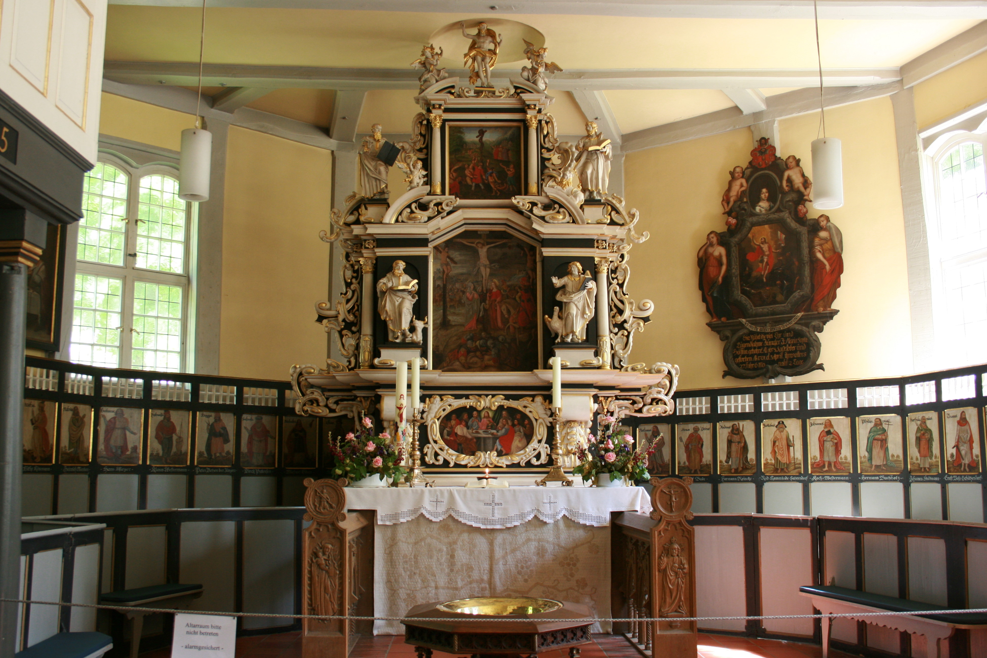 Sankt Stephanus in Egestorf